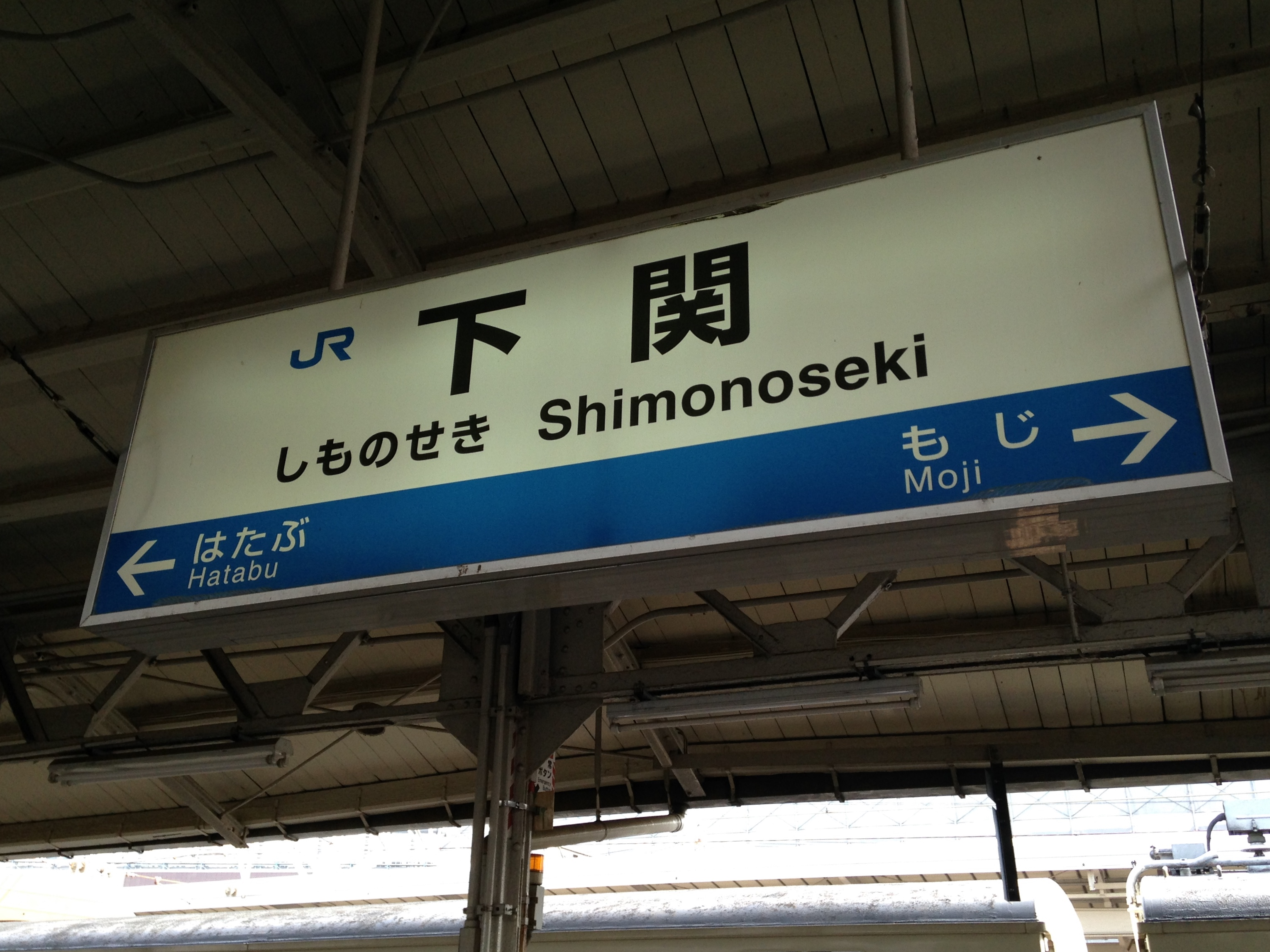 下関駅の駅名標